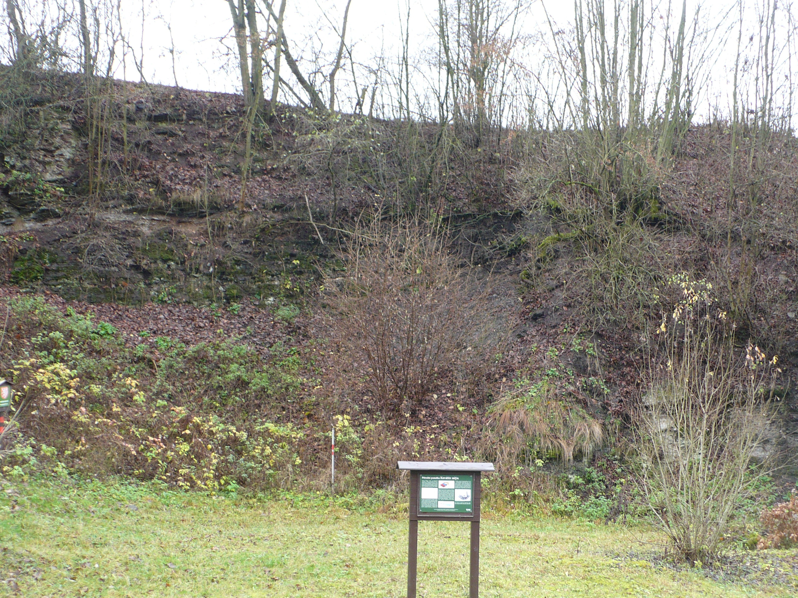 Prostor bývalého lomu s informační cedulí.